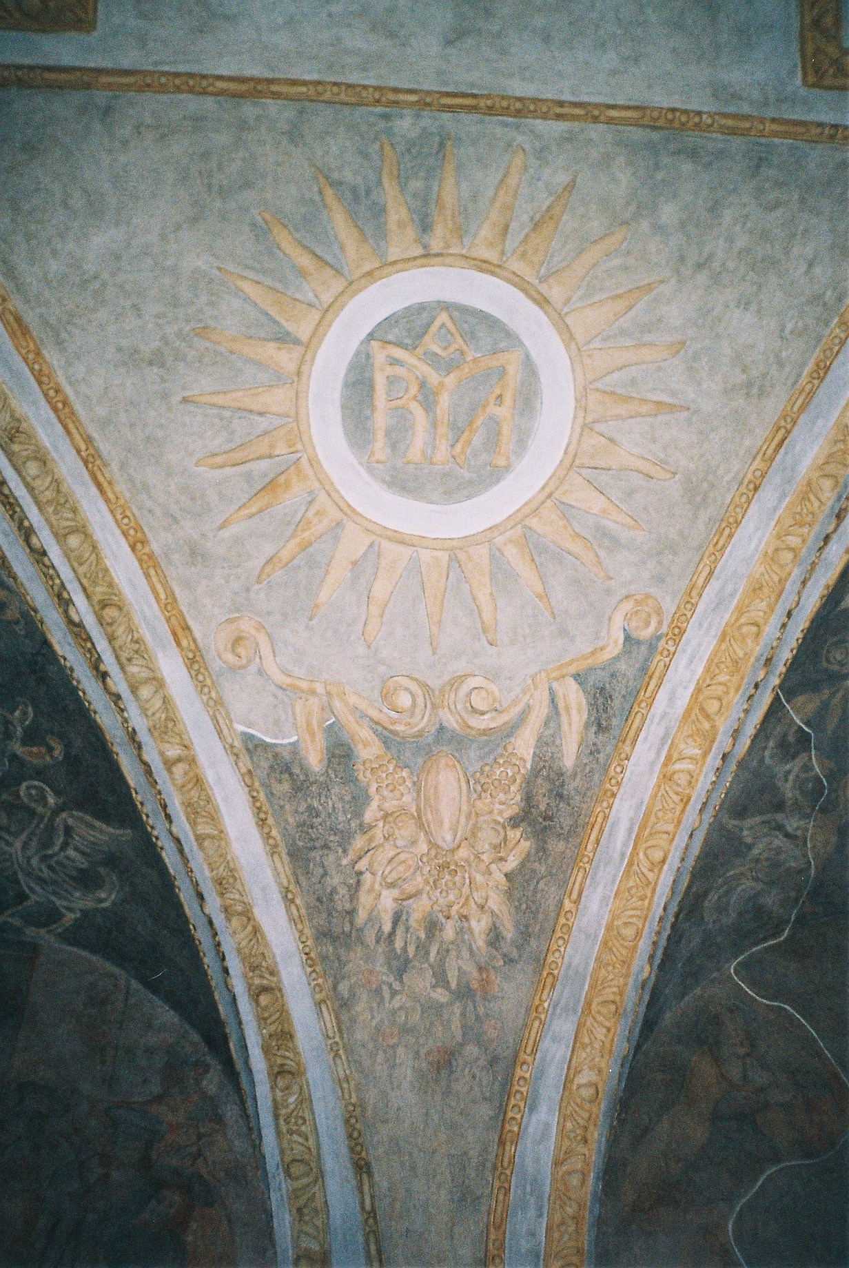 kamienica Gruszewiczów - wnętrze 16